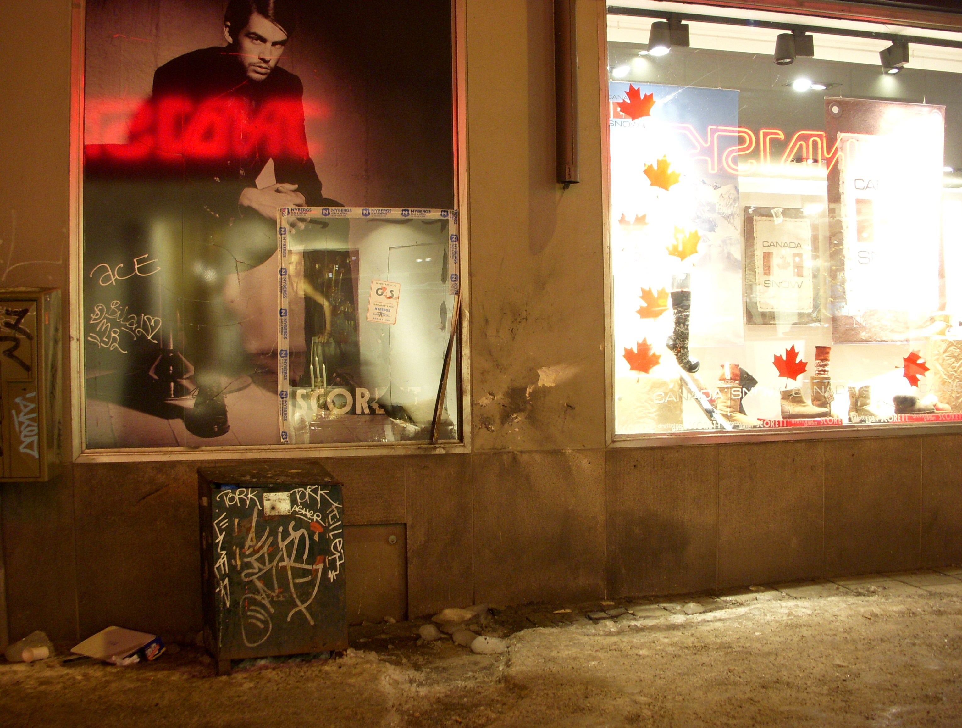 Tatort des Bombenanschlags in Stockholm 2010